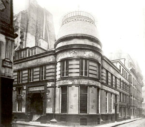 « Hôtel Bing » propriété de Siegfried Bing, marchand d'art à Paris, où se tenait des expositions ventes. Situé 22 rue de Provence, angle rue Chauchat, construit en 1895 par Louis Bonnier et détruit en 1922.